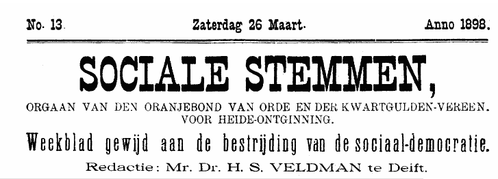 Kop van het blad "Sociale Stemmen" van de "Oranjebond van Orde" en de "Kwartguldenvereniging"